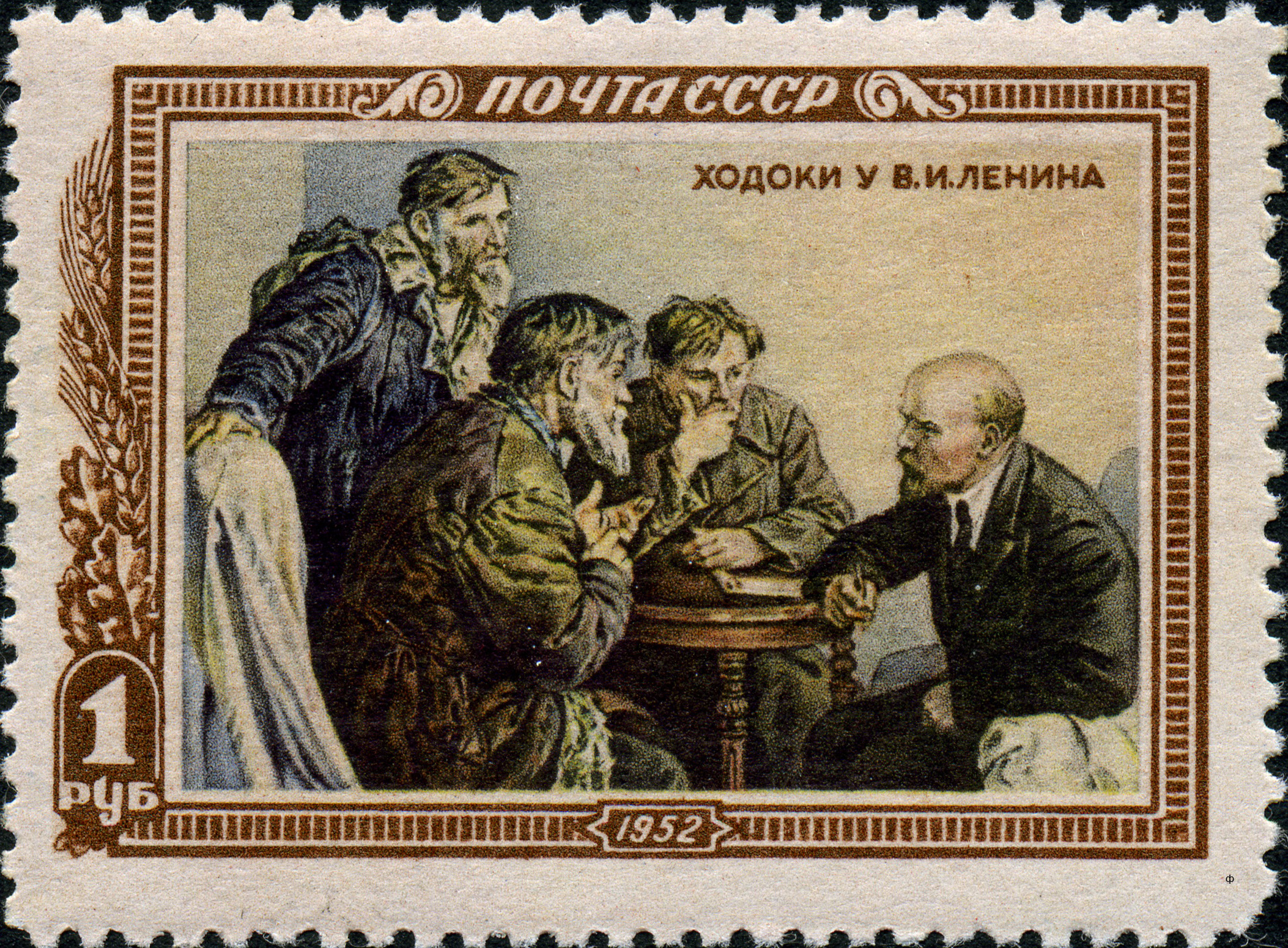 Марка СССР